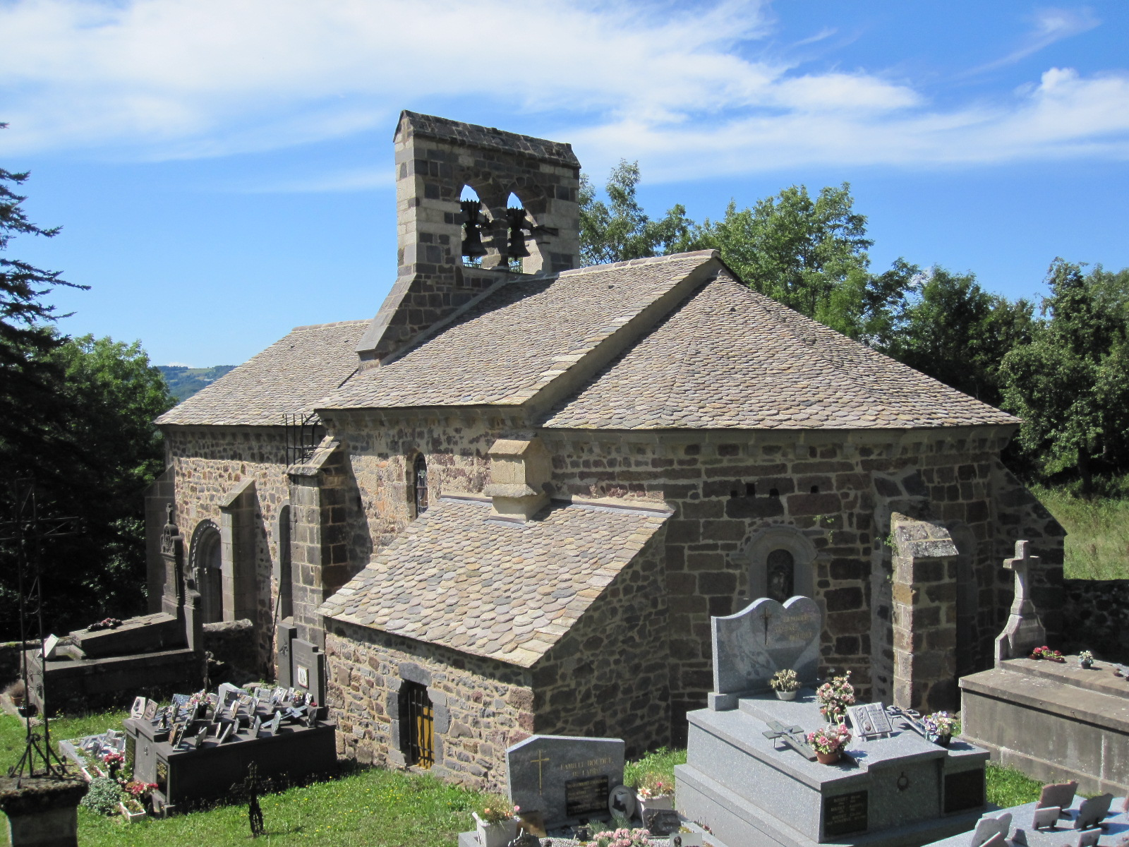 Église du village de Saint-Mary-le-Cros, Ferrières-Saint-Mary, Auvergne, France